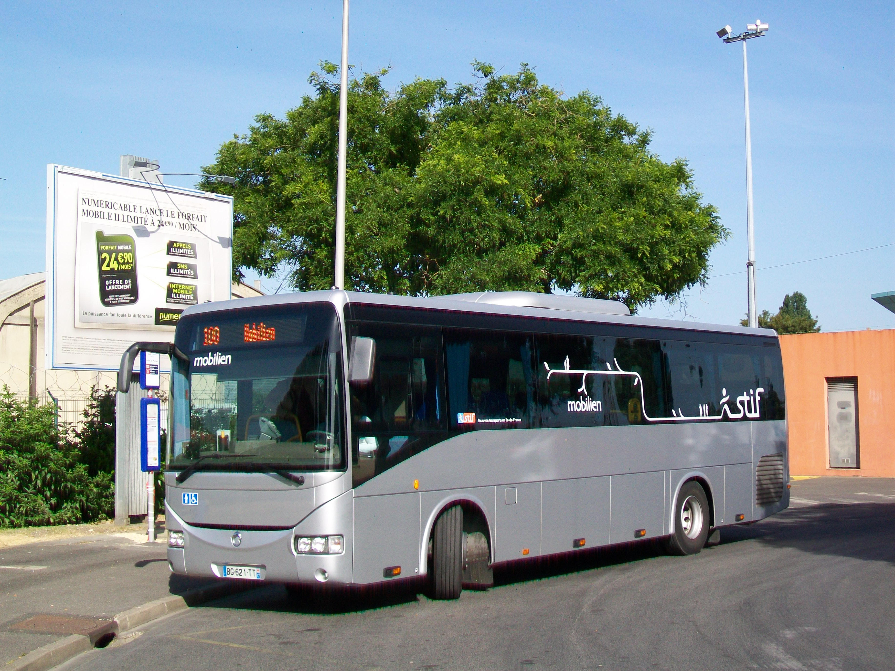 Un car de la ligne 100, ouverte début septembre 2010 par décision du STIF pour relier la gare SNCF de Persan-Beaumont à l'aéroport de Roissy-Charles de Gaulle. Cette ligne est exploitée par les Courriers d'Île-de-France.